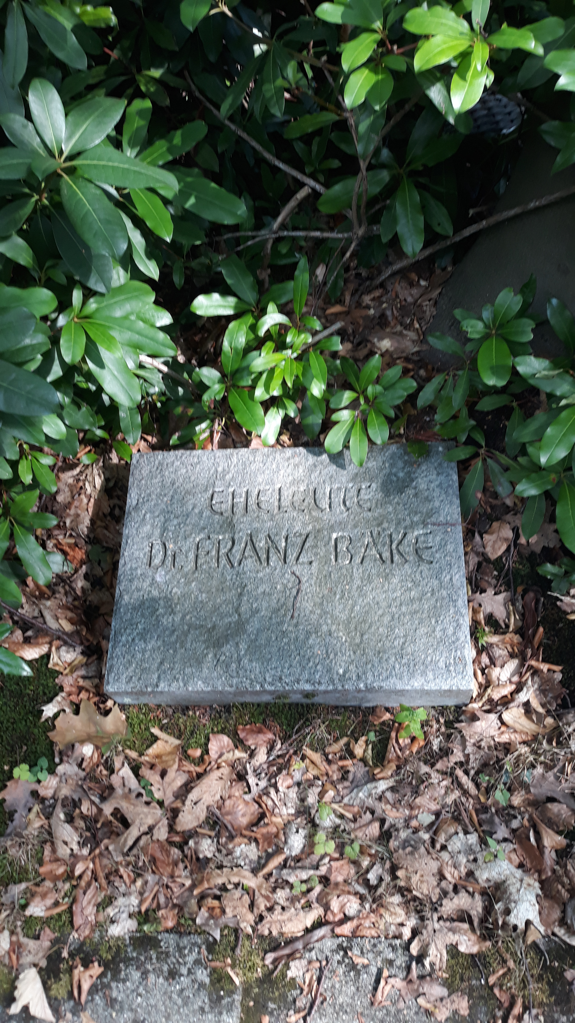 Das Familiengrab des deutschen Offiziers und Zahnarztes Franz Bäke auf dem Waldfriedhof Loxbaum in Hagen (Westfalen).